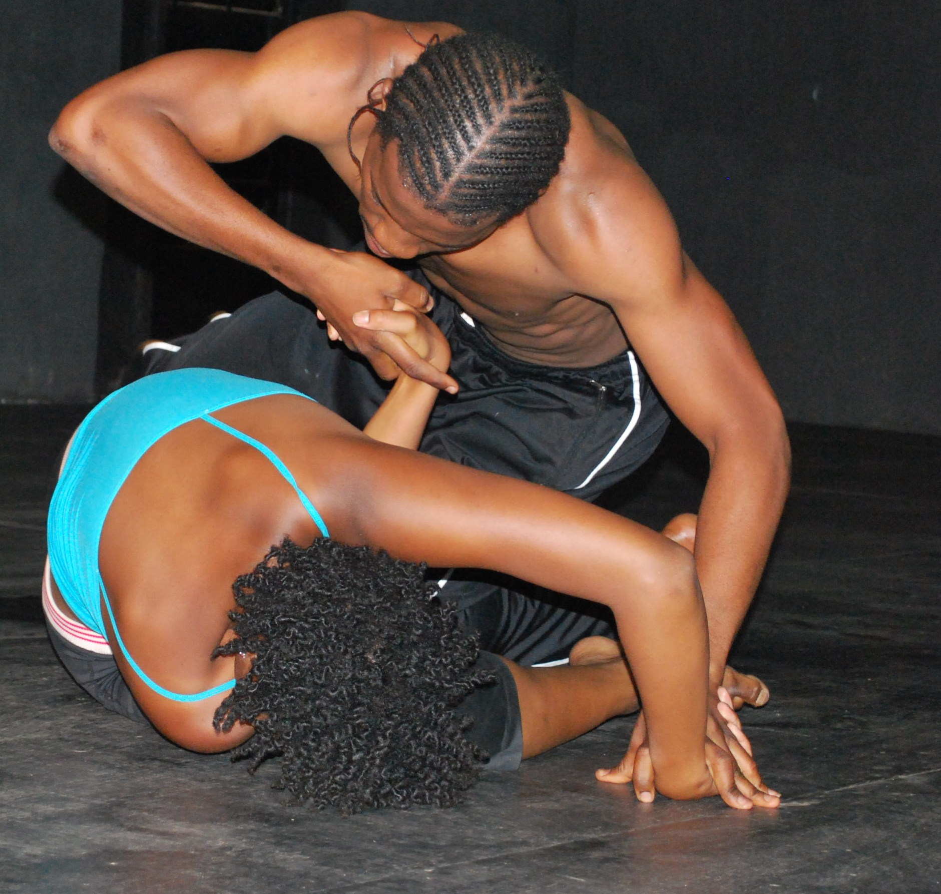 Tryptique "Mousso Sirakan Lacrima" 2010